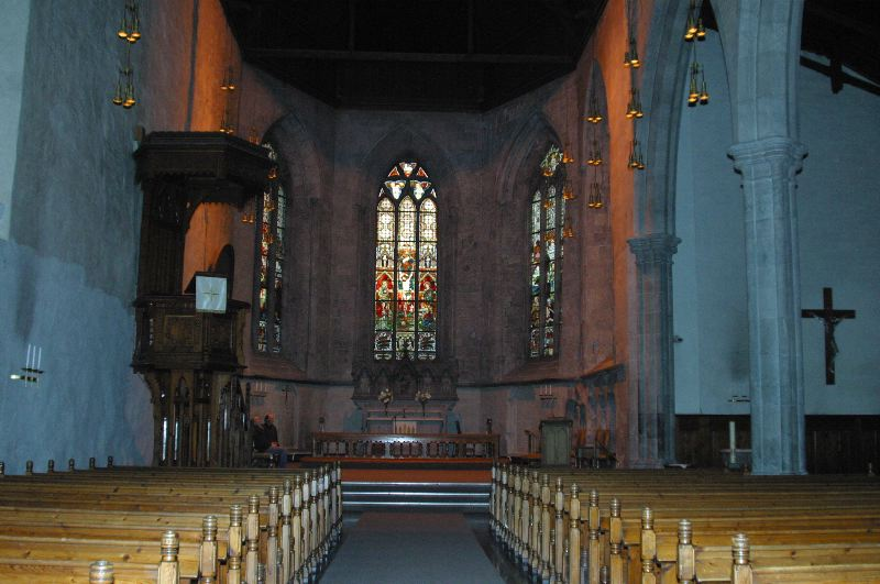 Domkirken i Bergen, interiør. Foto: Nina Aldin Thune.